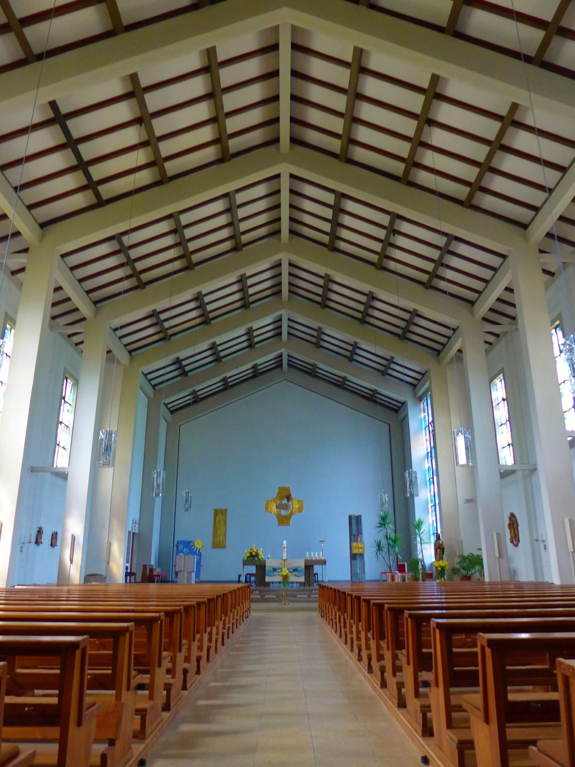 Wertheim-Bestenheid, St. Elisabeth, Inneres